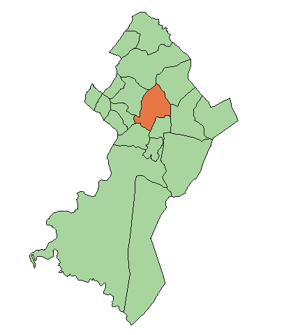 Ubicación de Capiatá.